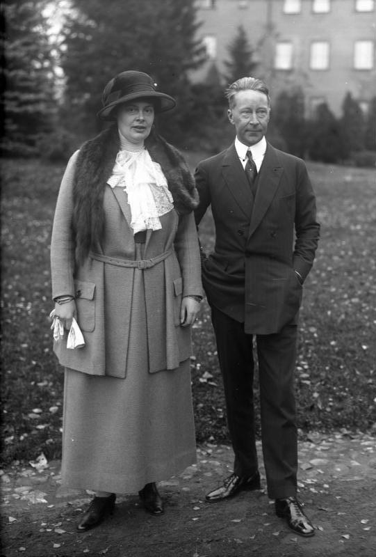 Silberhochzeit des deutschen Ex-Kronprinzenpaares! Aufnahme des deutschen Ex-Kronprinzenpaares, welches am 6. Juni ihre Silberhochzeit feiert, auf Schloss Oels in Schlesien.